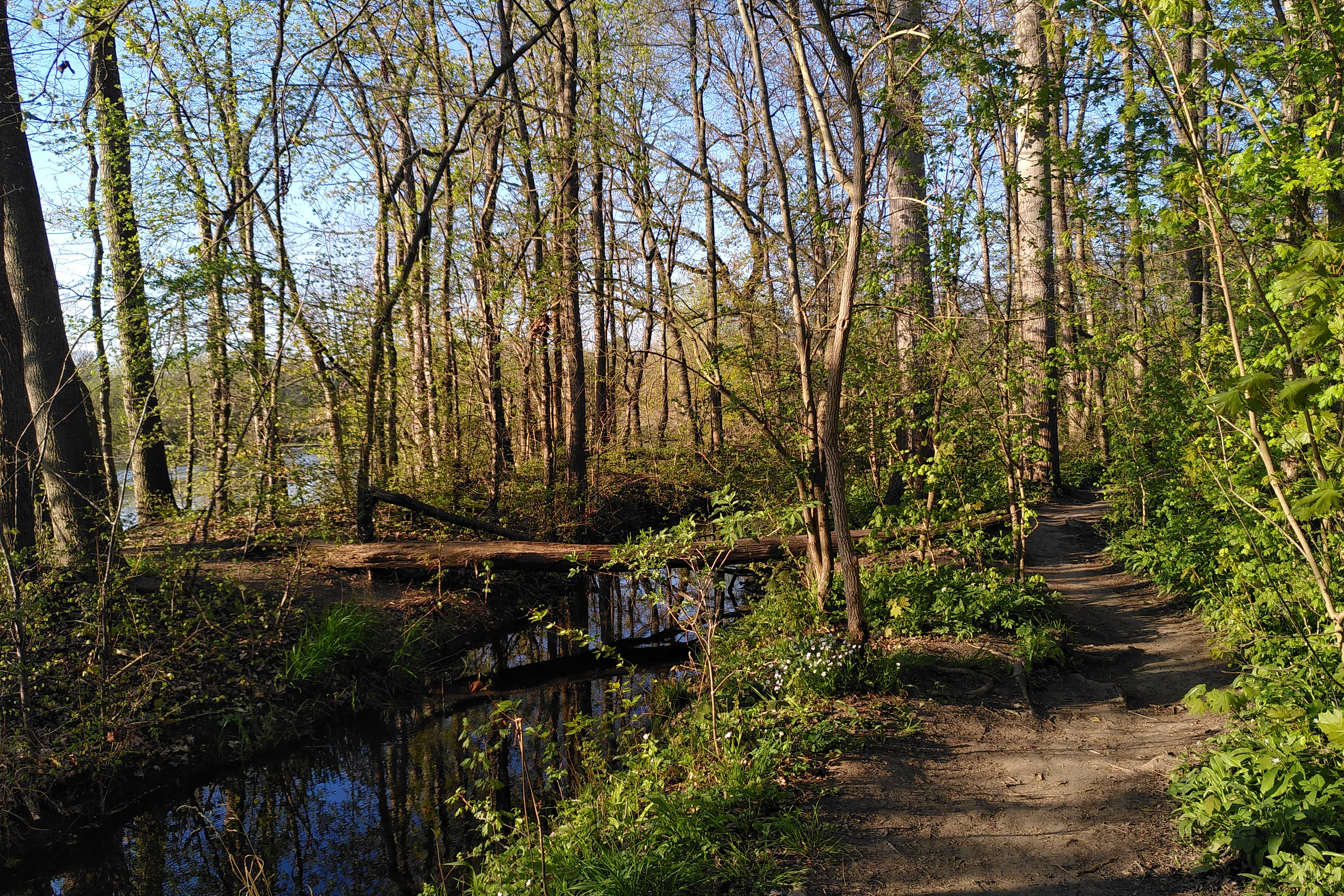 Weg und Burgauebach im NSG Burgaue (NSG 162642)